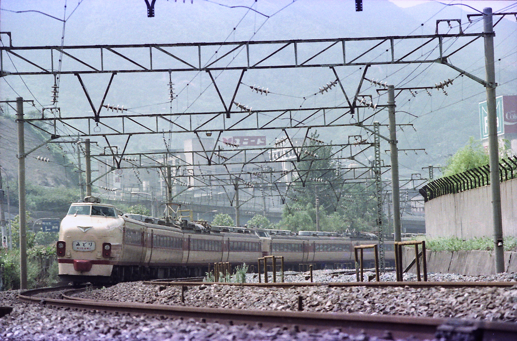 特急「みどり」小倉発 鹿児島本線 枝光駅-八幡駅（旧線） 枝光カーブ